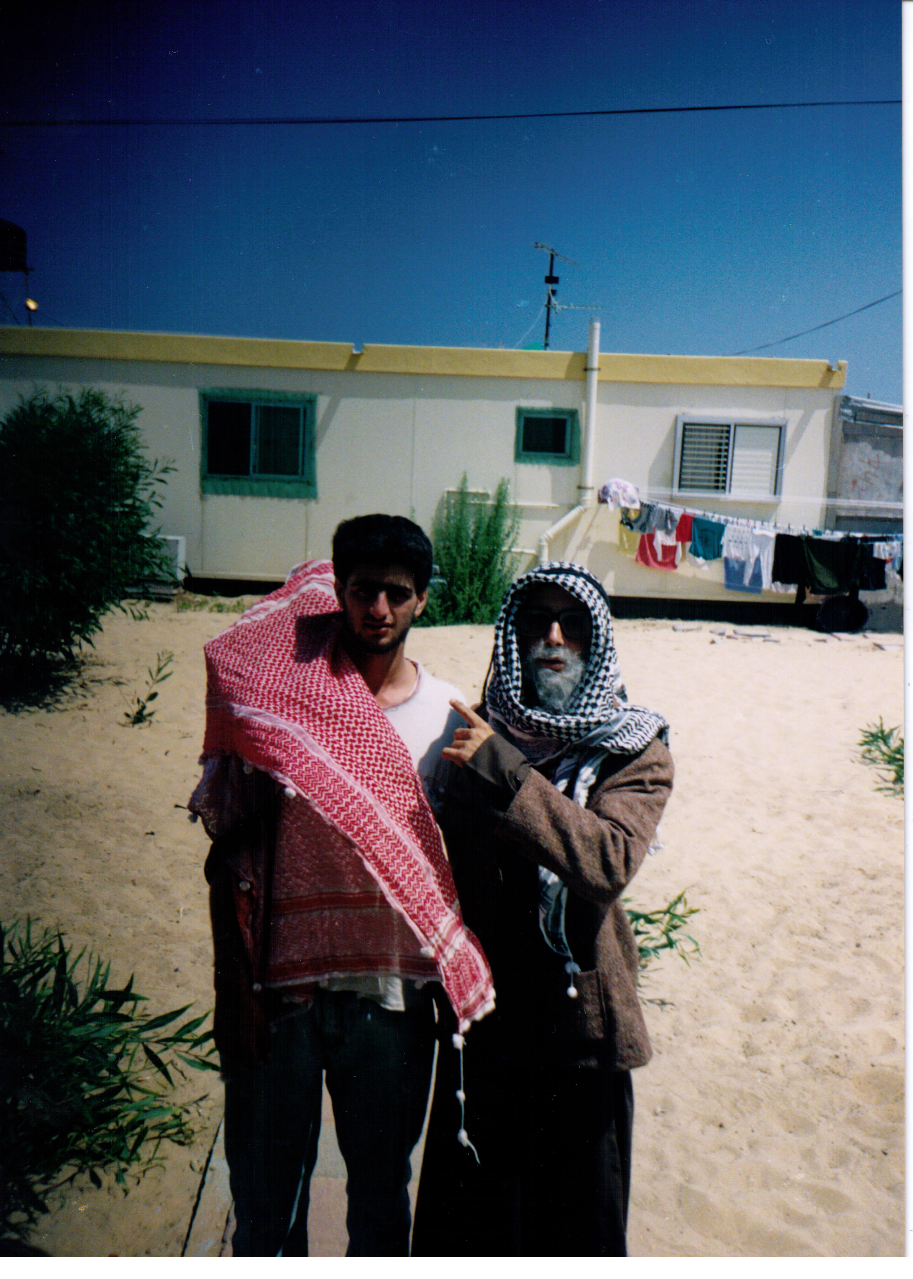 דורון דרזי לקראת הסתערבות